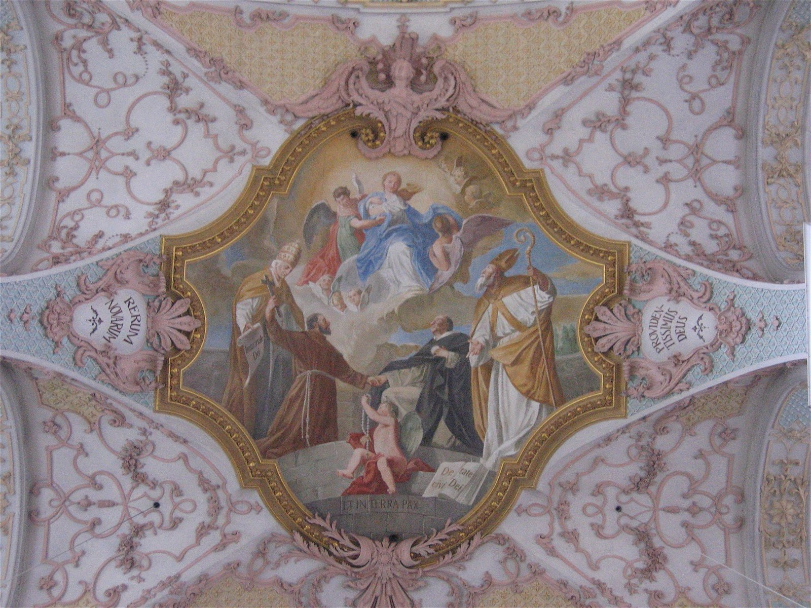 Heilig-Geist-Kirche, München, Deckenfresko: Wiederherstellung einer christlichen Staatsordnung